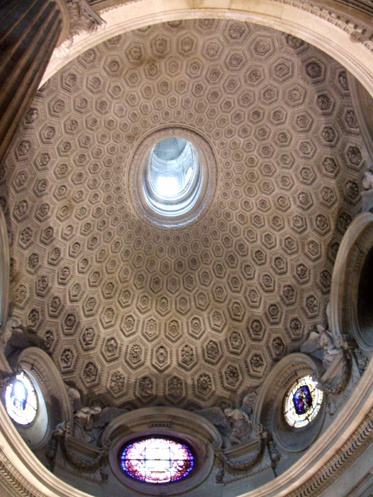 Iglesia del Sagrario (Catedral de Jaén)